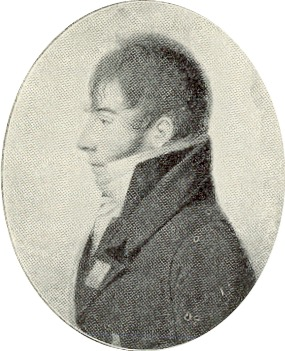 Carl Otto Mörner (1781-1868)